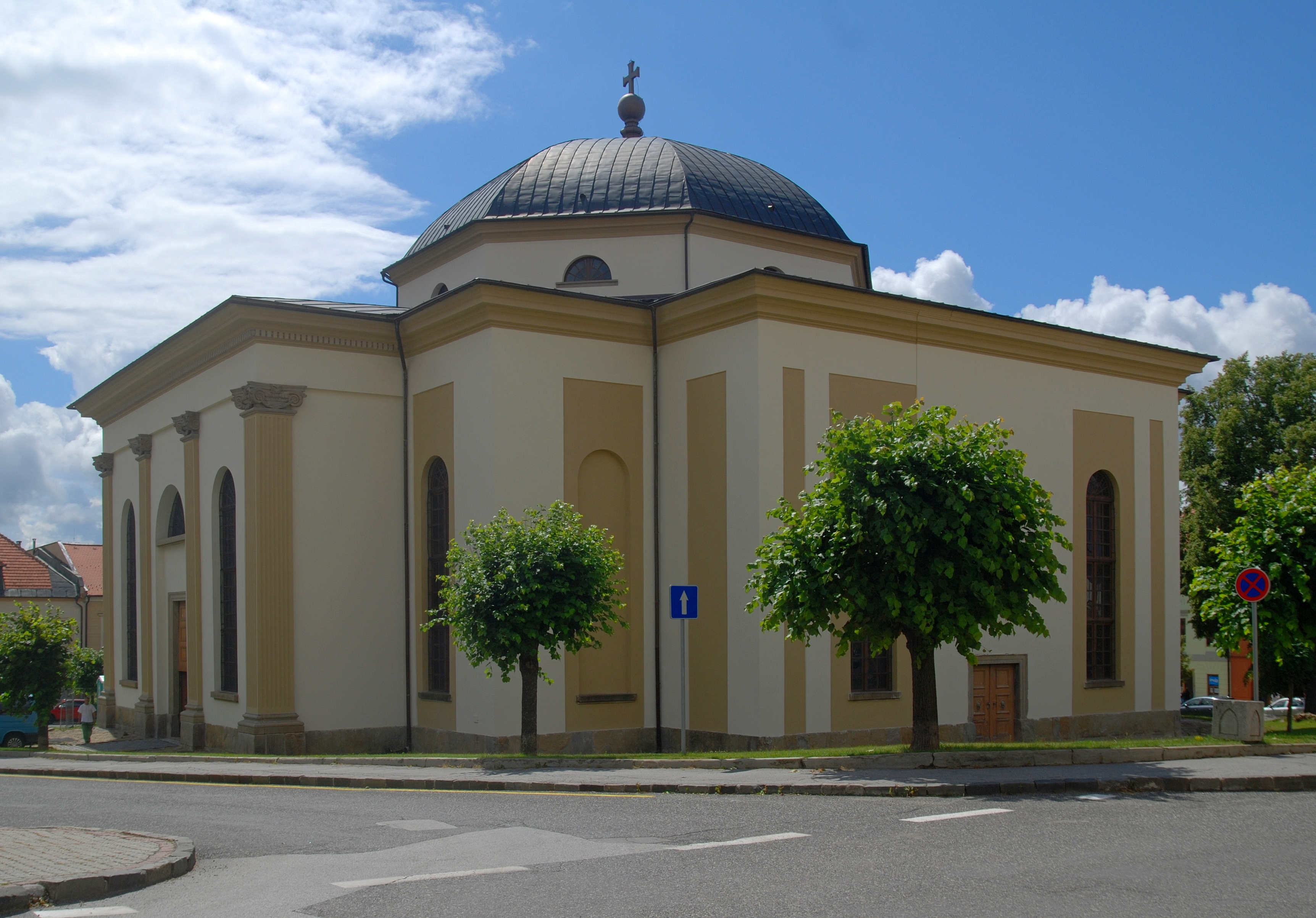 miasto Levoča